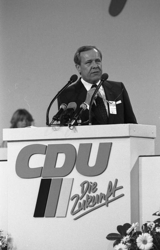 7./8.10.1986 34. Bundesparteitag der CDU in der Rheingoldhalle, Mainz (6.-8.10.1986)